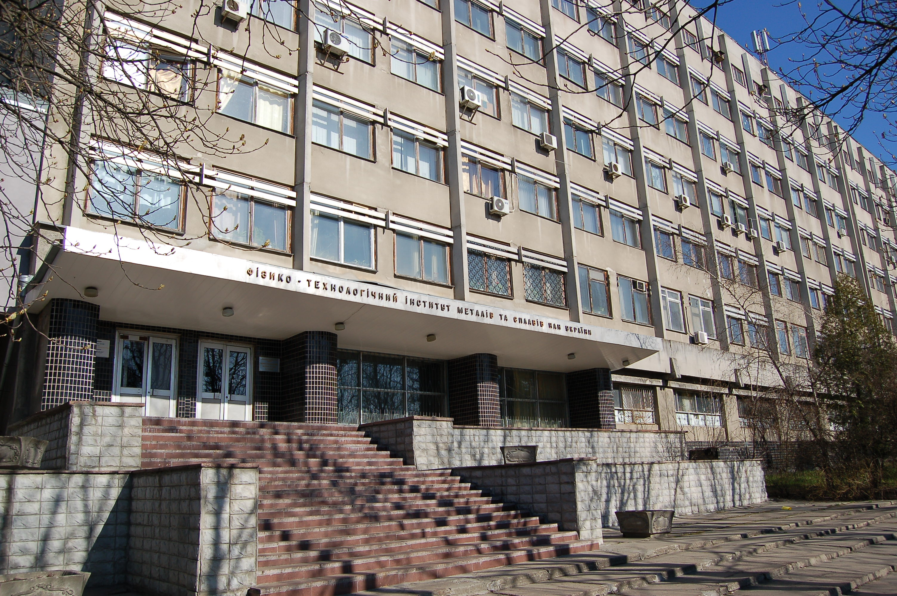 Физико-технологический институт металлов и сплавов НАН Украины (Киев, ул. Академика Кржижановского, 1)